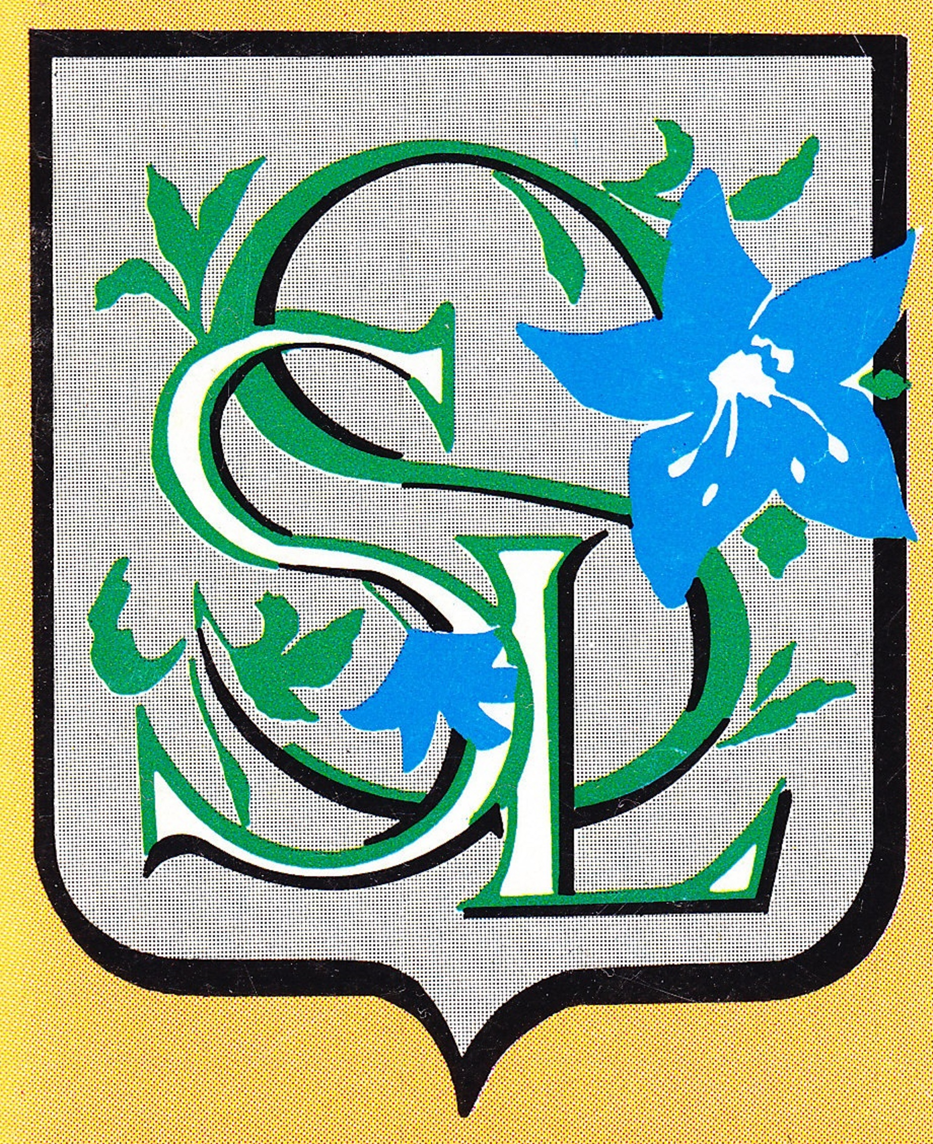 Blason du bourg de Renazé, dans le canton de Saint-Aignan-sur-Roë dans le département de la Mayenne, en France (53390).